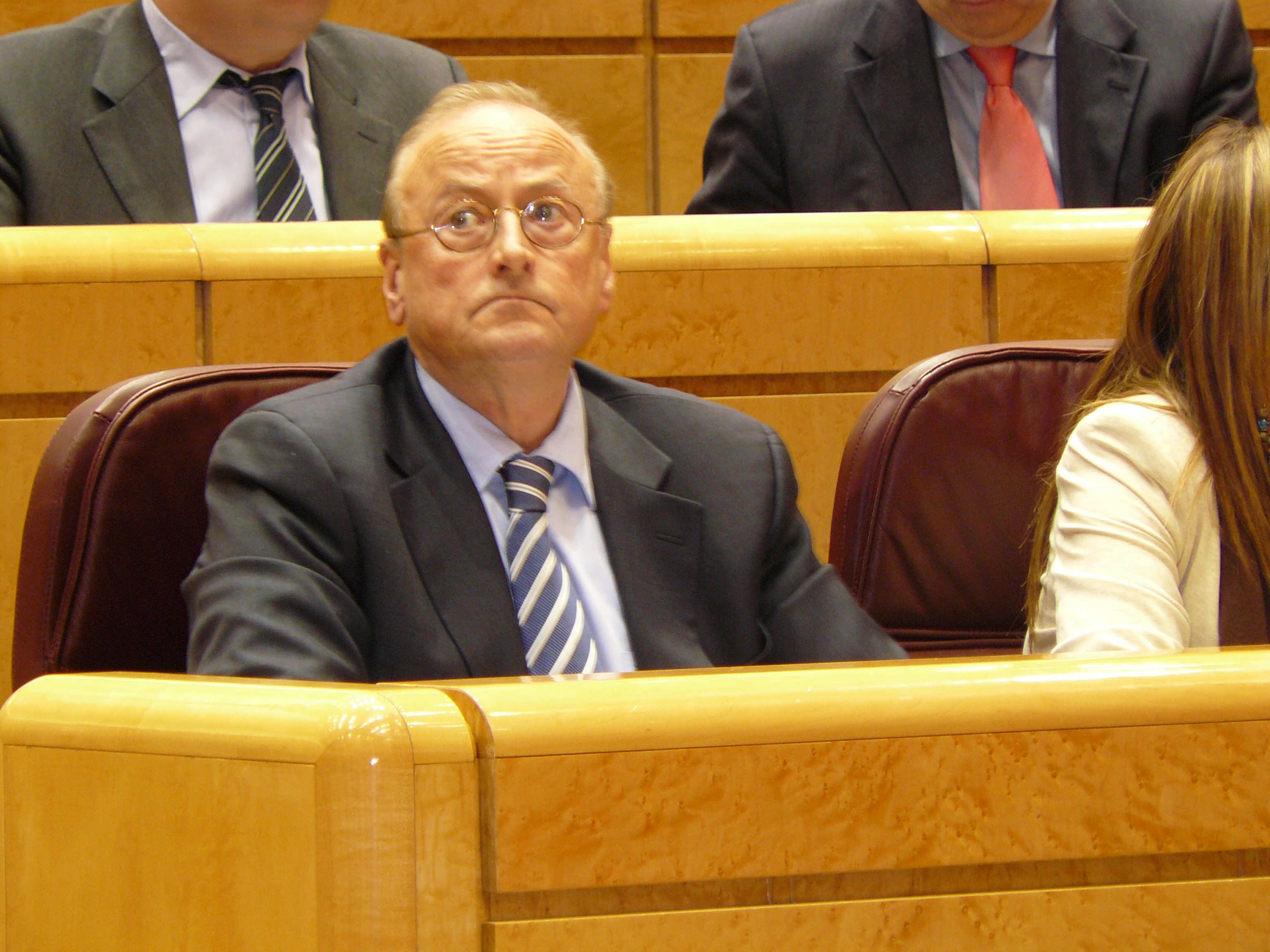 Jordi Vilajoana Hemicicle Sessió Control Rajoy.06.03.12.